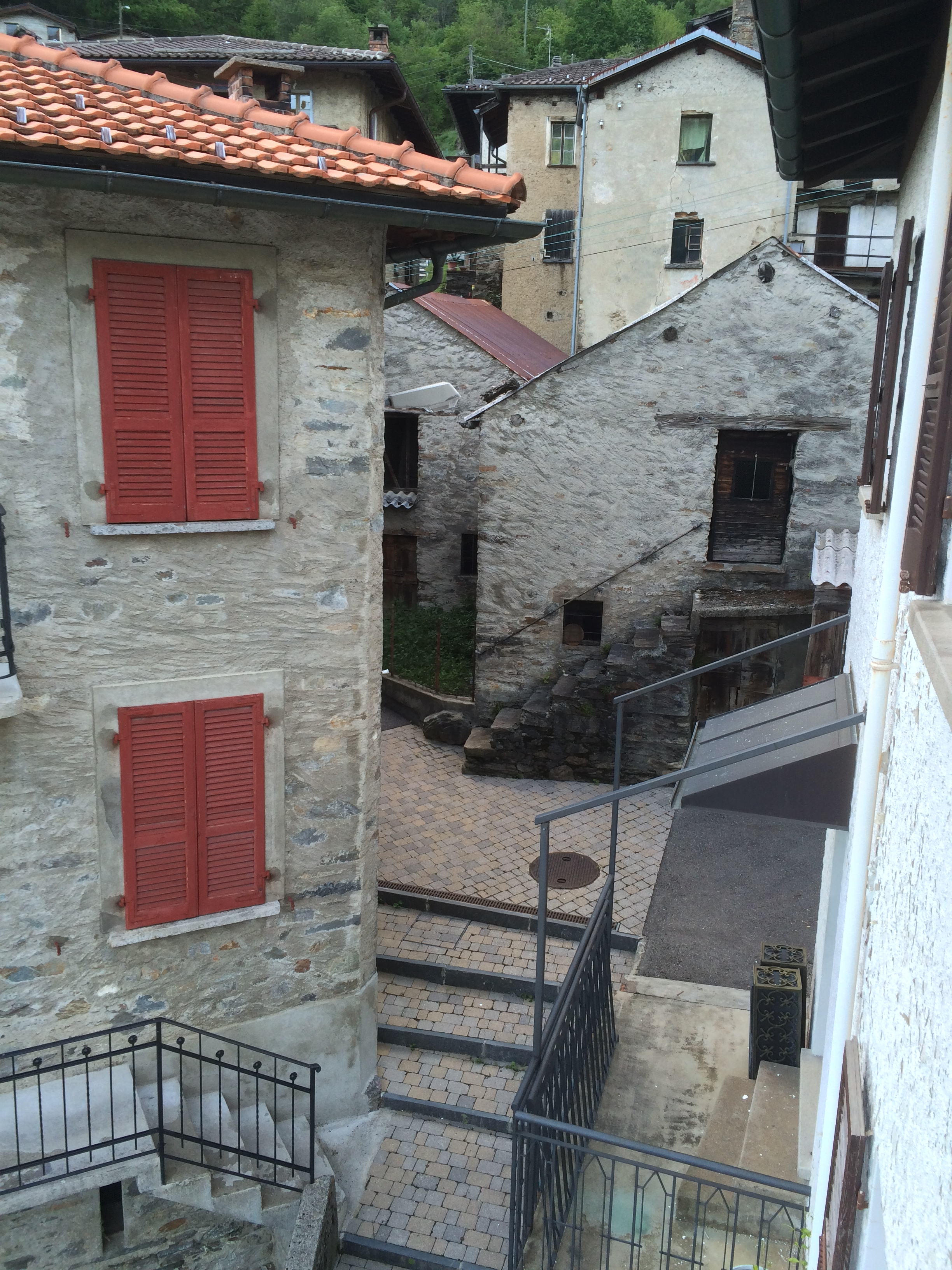 ISONE